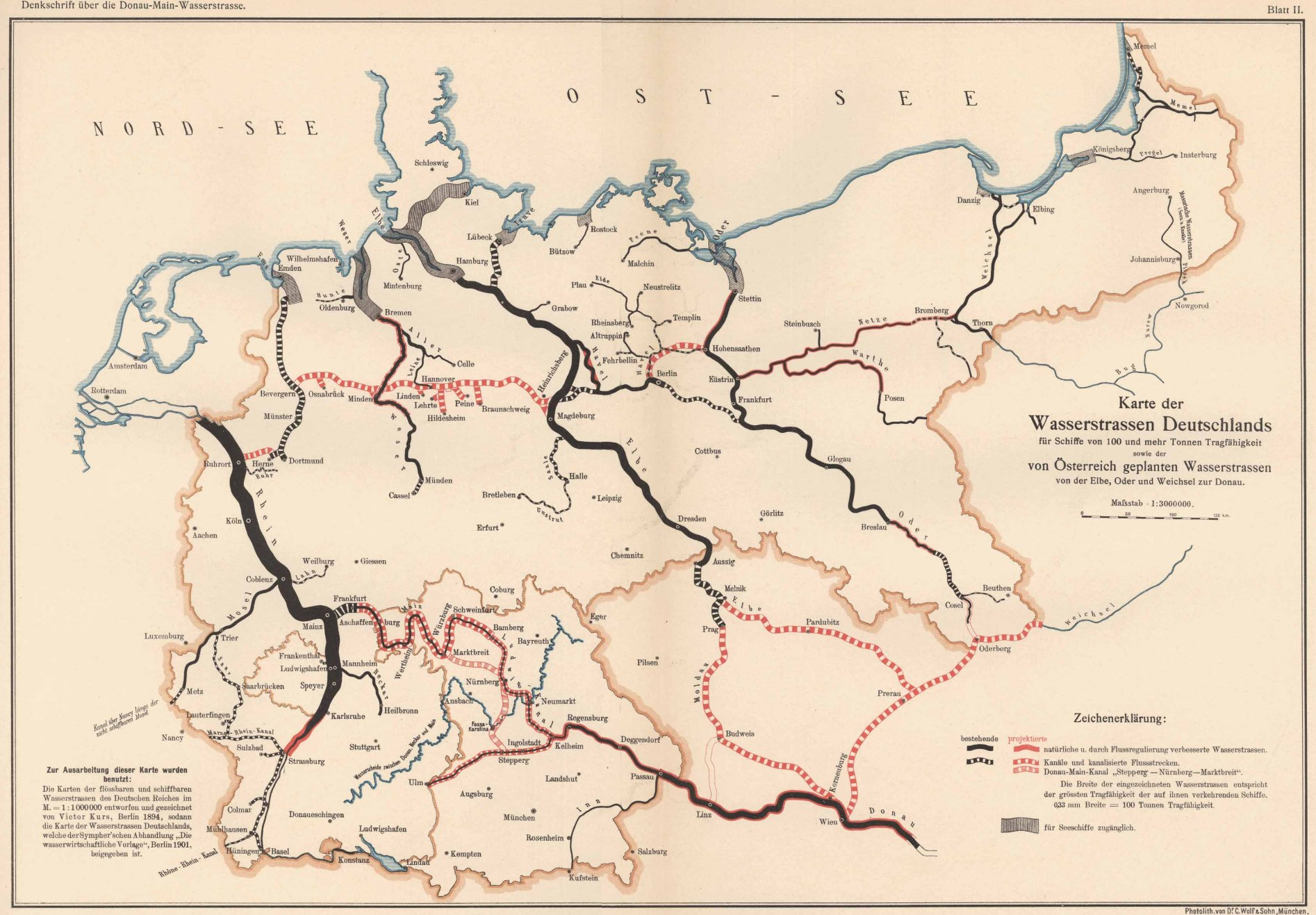 Karte der Wasserstrassen Deutschlandsfür Schiffe von 100 und mehr Tonnen Tragfähigkeitsowie dervon Österreich geplanten Wasserstrassenvon der Elbe, Oder und Weichsel zur Donau.Karte (Blatt II) ausDenkschrift zu dem technischen Entwurf einer neuen Donau-Main-Wasserstrasse von Kelheim nach Aschaffenburg,bearbeitet von Eduard Faber [(† 1930)],kgl. Bauamtmann und Vorstand des technischen Amtesdes Vereines für Hebung der Fluss- und Kanalschiffahrt in Bayern.Verlegtvon dem Vereine für Hebung der Fluss- und Kanalschiffahrt in Bayern.1903.